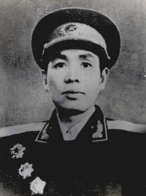 中文（中国大陆）: 丁盛少将1955年授衔照